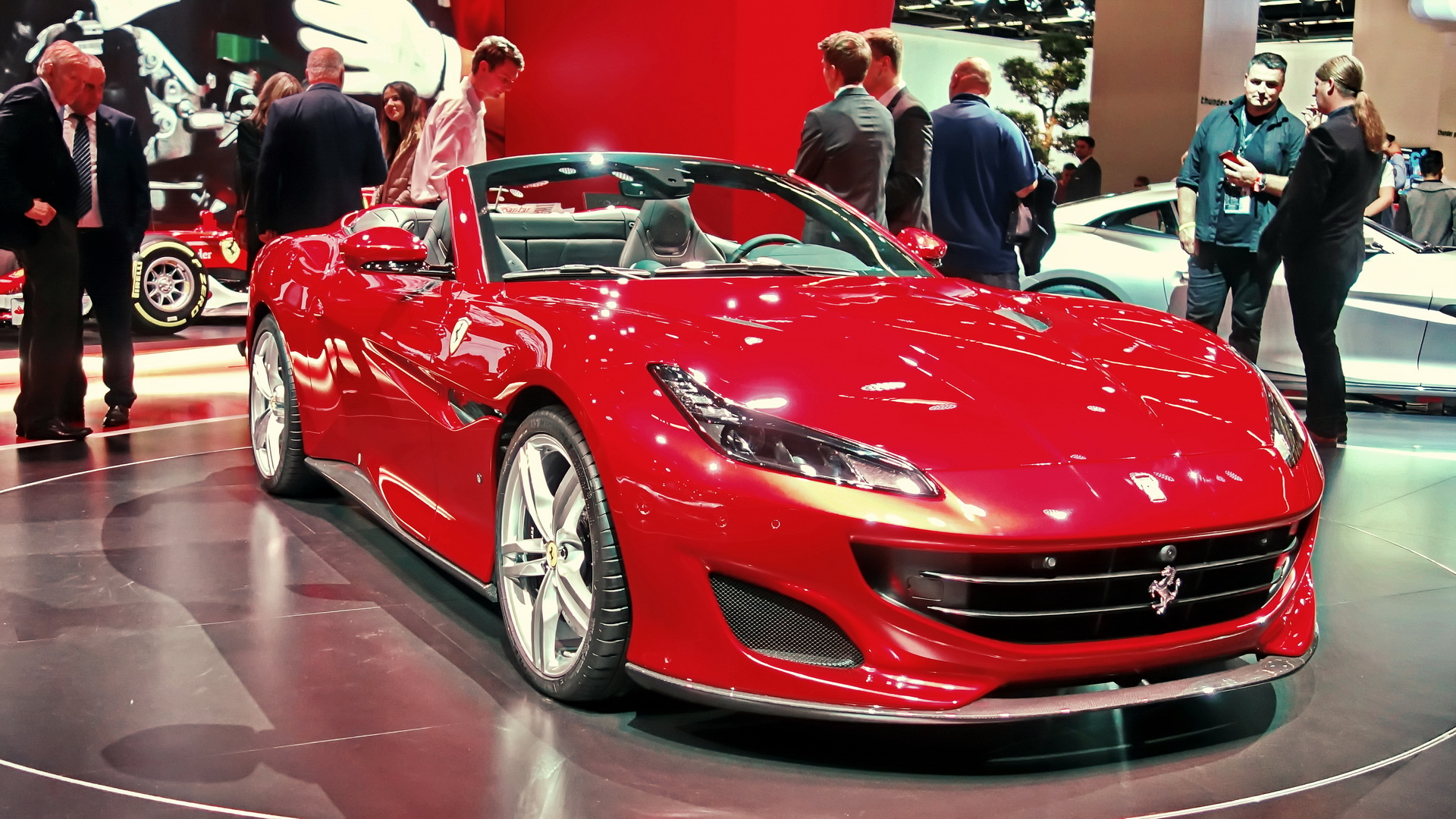 Ferrari Portofino